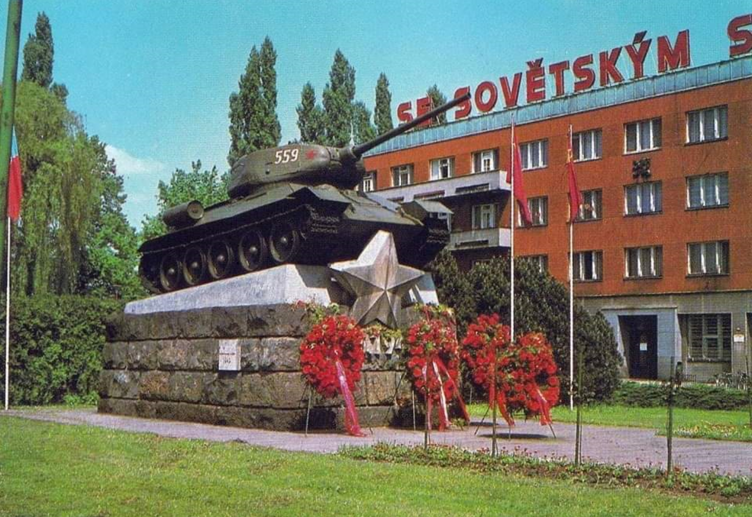 Památník osvobození města Rudou armádou na náměstí Osvoboditelů v Hradci Králové (80. léta).